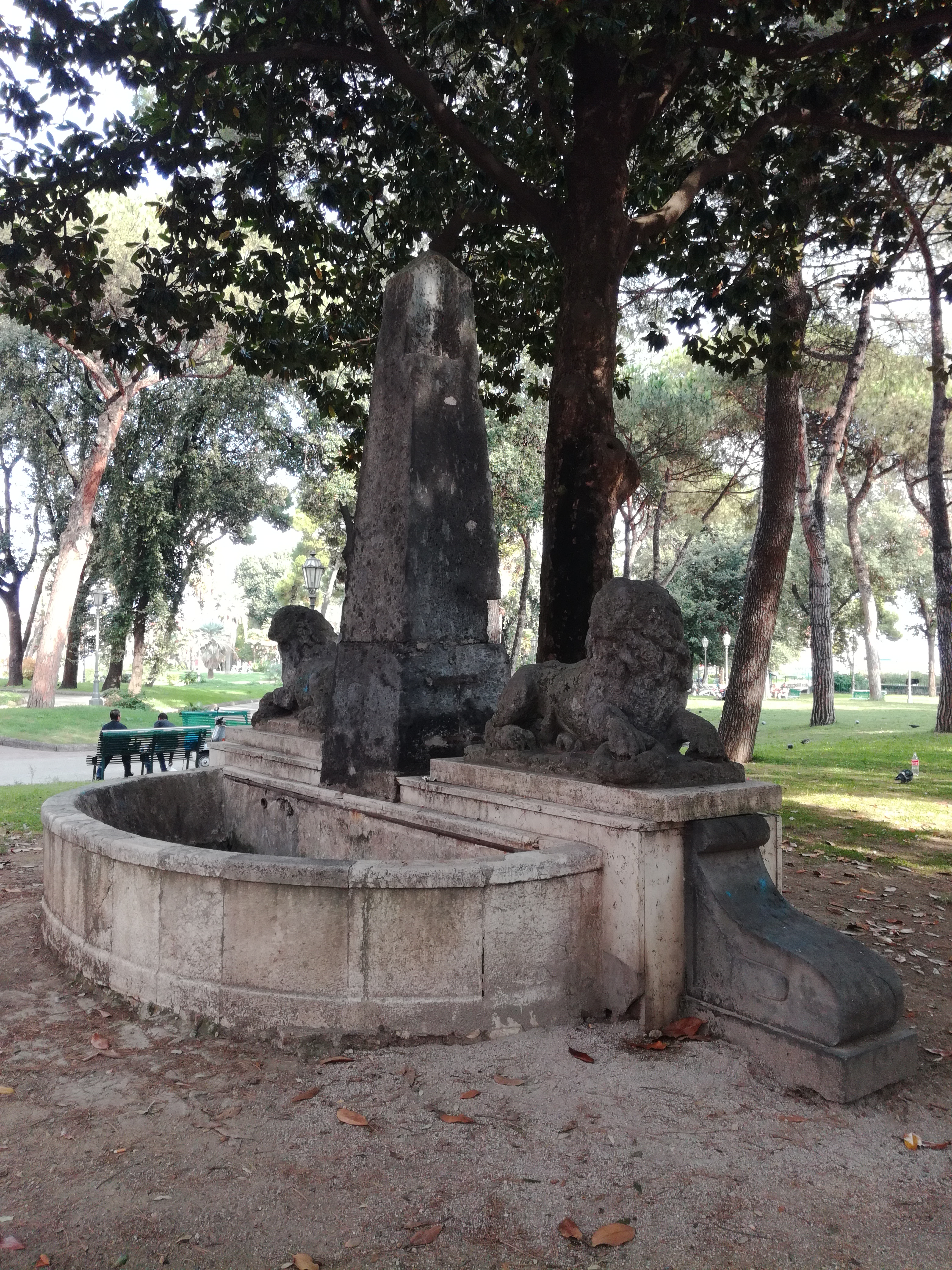 Fontana dei Leoni, Napoli (in degrado)